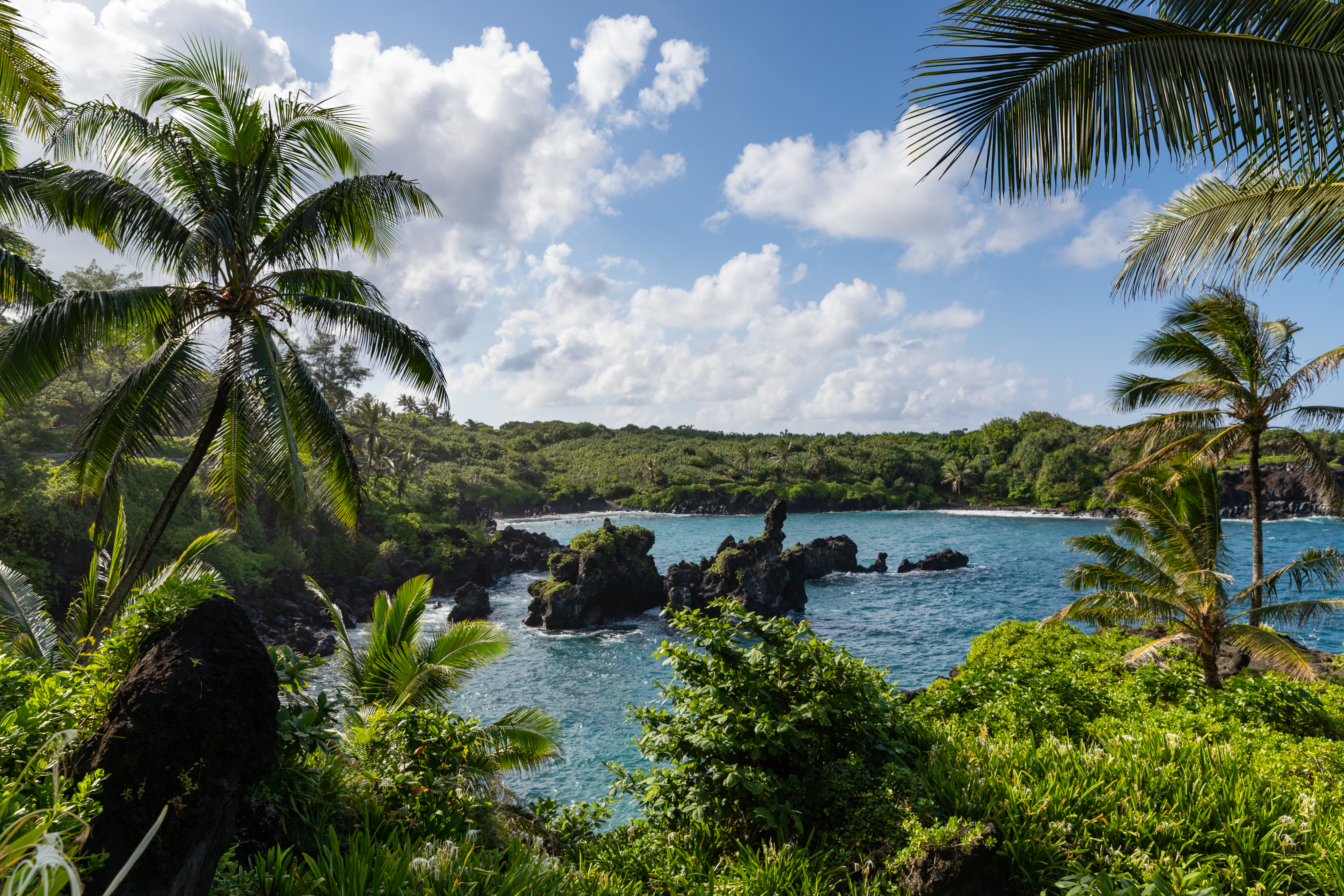 Waianapanapa State Park Maui Hawaii Road to Hana